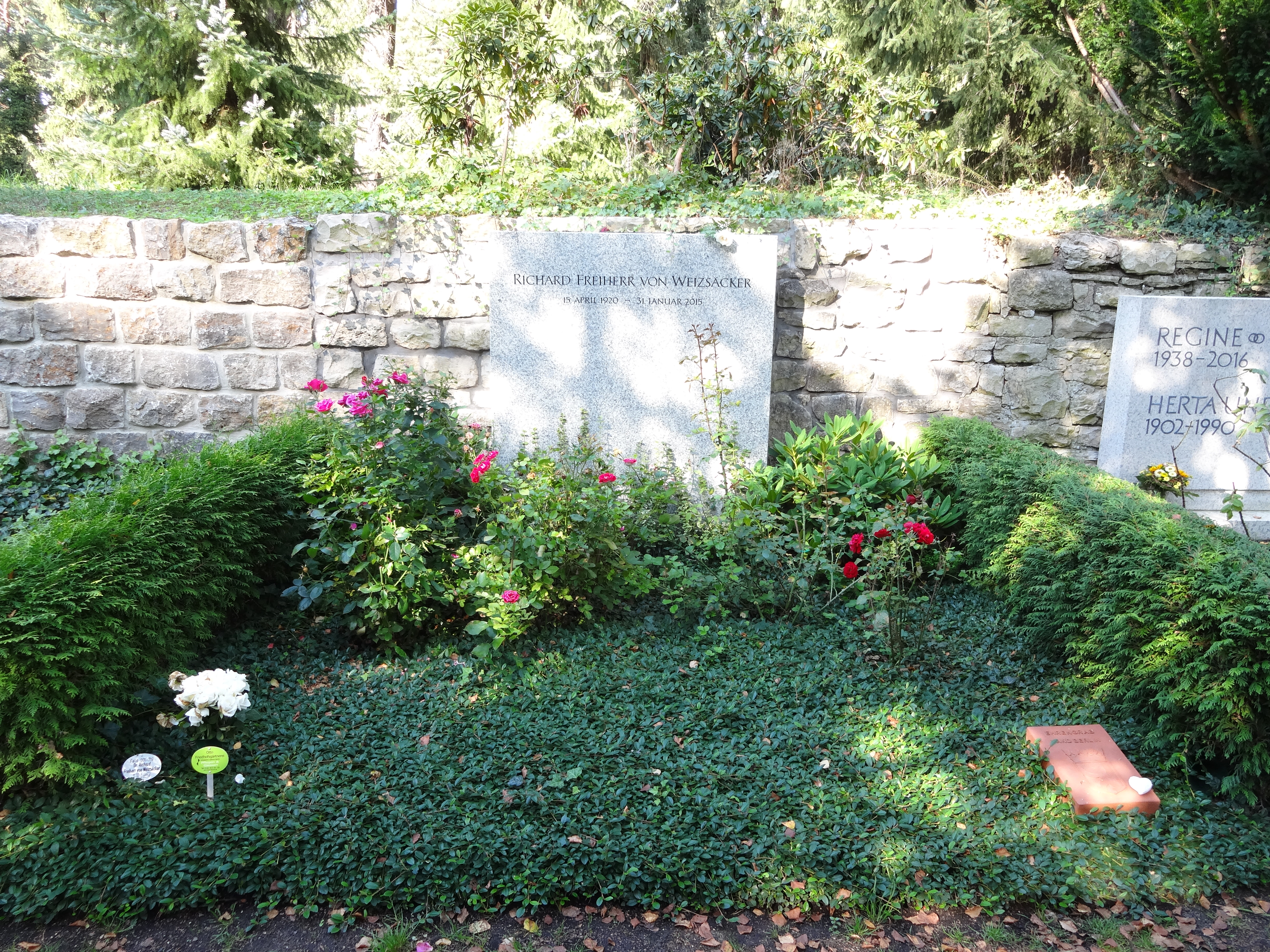 Ehrengrab für Richard von Weizsäcker auf dem Waldfriedhof Dahlem; der Friedhof ist ein Gartendenkmal in BerlinThis is a photograph of an architectural monument.